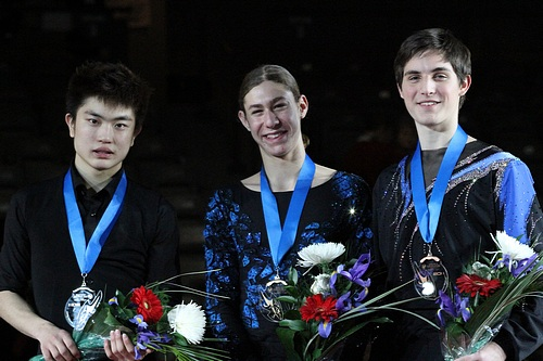 Подиум в мужском одиночном катании финала Гран-при среди юниоров сезона 2011-2012. Слева на право: Янь Хань (2-е место), Джейсон Браун (1-е место), Джошуа Фаррис (3-е место)